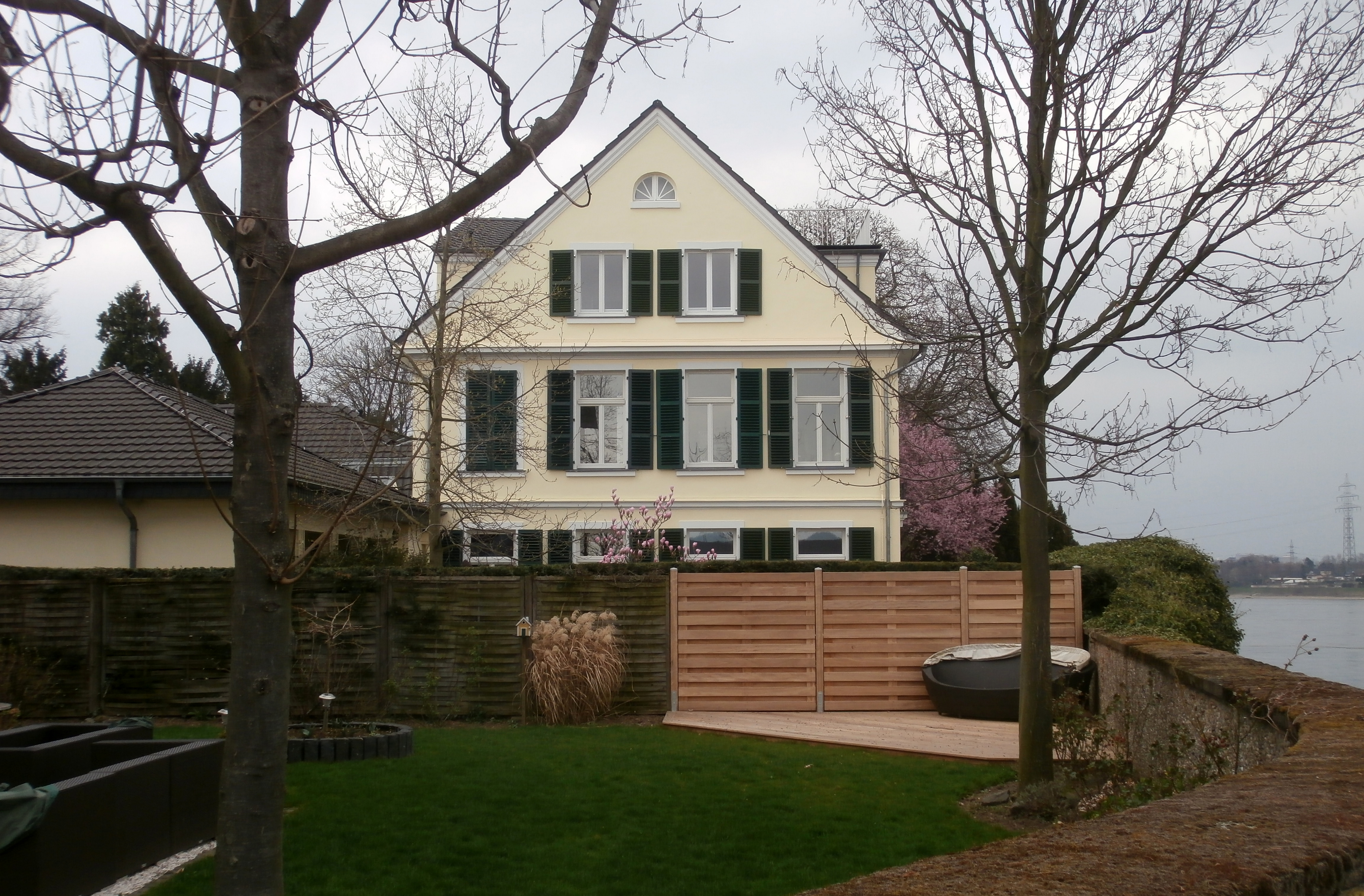 Dietkirchener Hof, Rheinstraße 161–165, Urfeld, Wesseling: Herrenhaus (Rheinstraße 161), Ansicht der Südseite